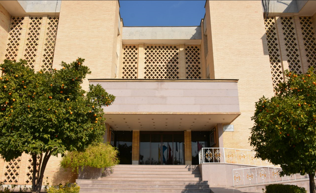 تصویری که در حال مشاهده آن هستید دانشکده مهندسی کامپیوتر و فناوری اطلاعات دانشگاه صنعتی شیراز می باشد.